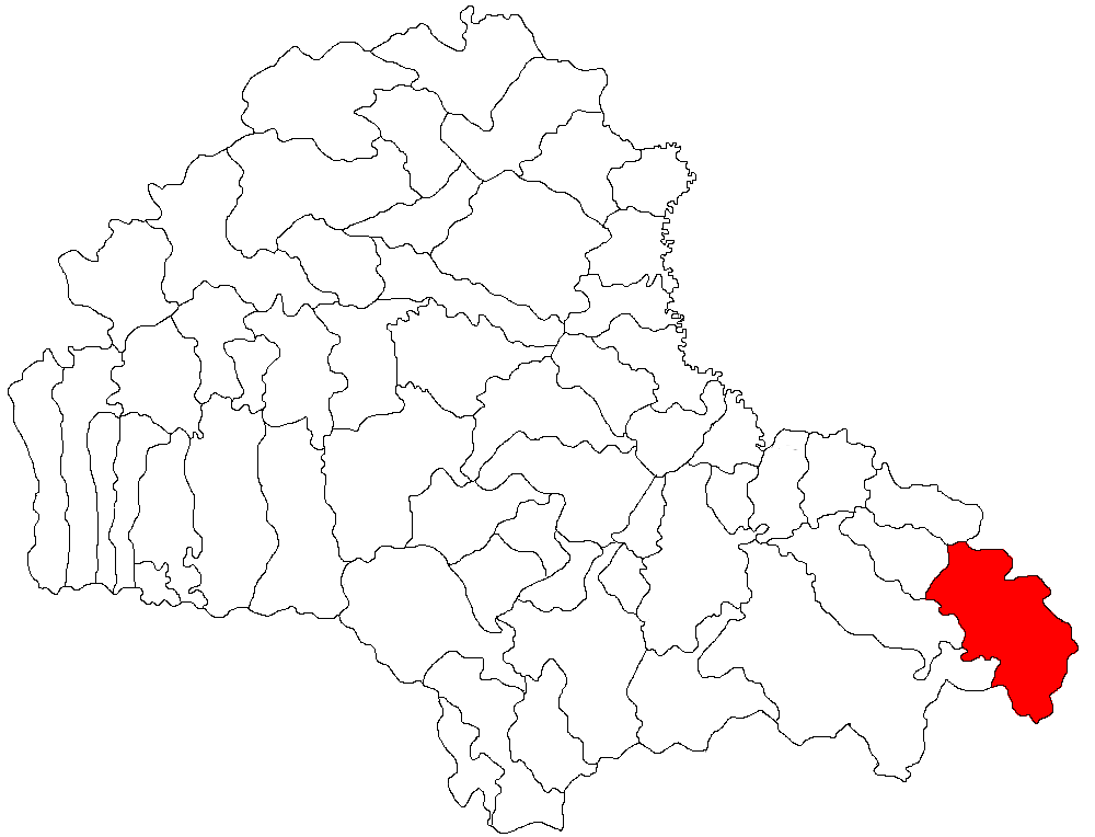 Categorie:Hărţi ale judeţului Braşov